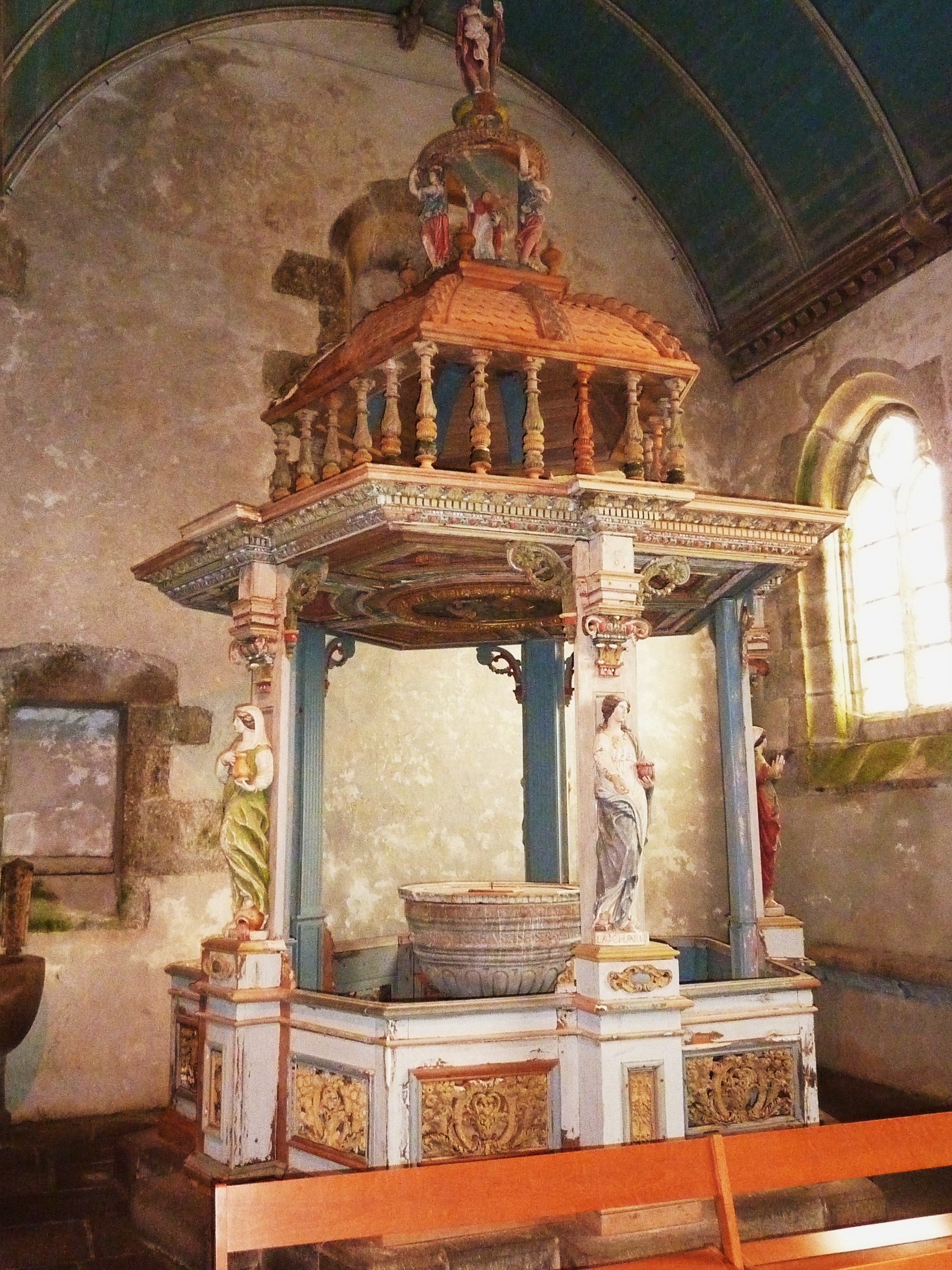 Commana Le baptistère (XVIIIème siècle) de l'église Saint-Derrien